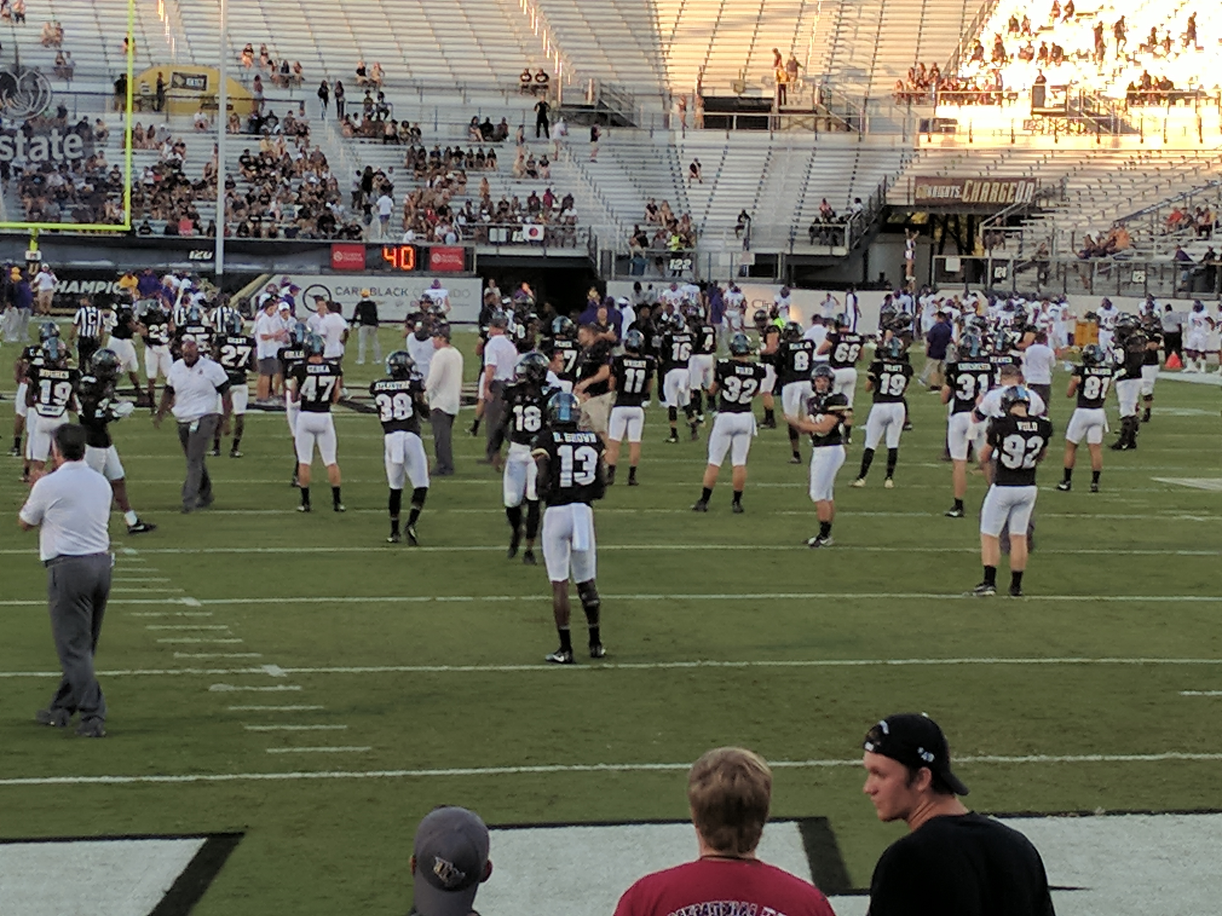 ECU at UCF